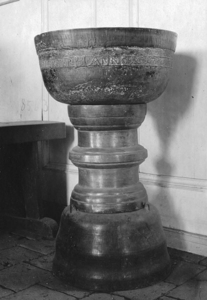 Dopfunt. Snabbinv. Kategori: (04) DopfuntarDopfunt. Snabbinv.